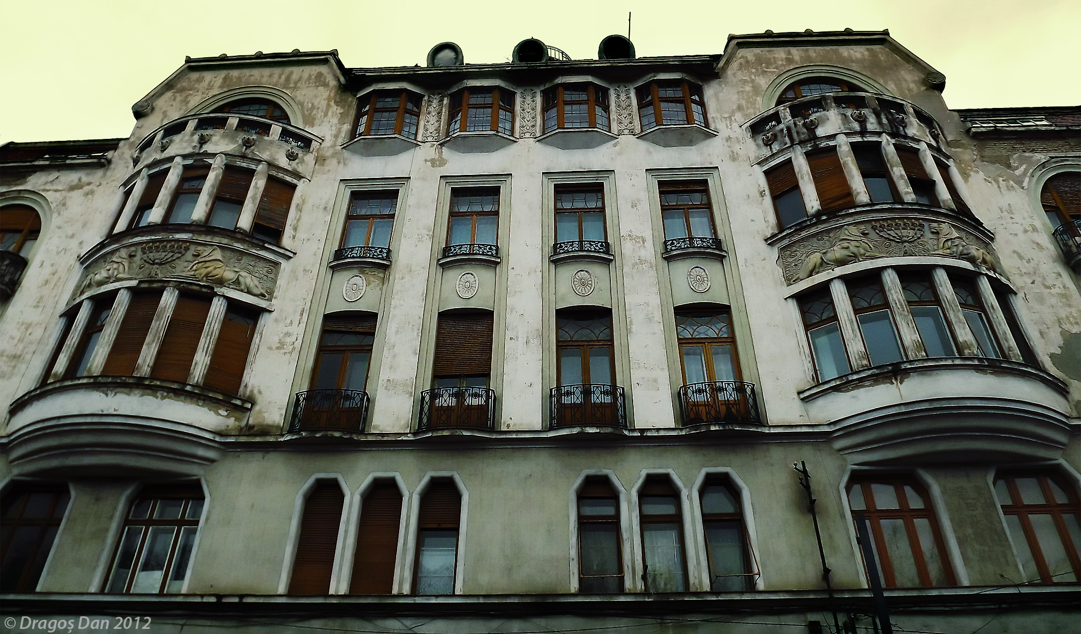 A fost construit in anul 1913 in stil secession dupa proiectul lui Lobl Ferenc. Geamurile palatului sunt impodobite cu vitralii.